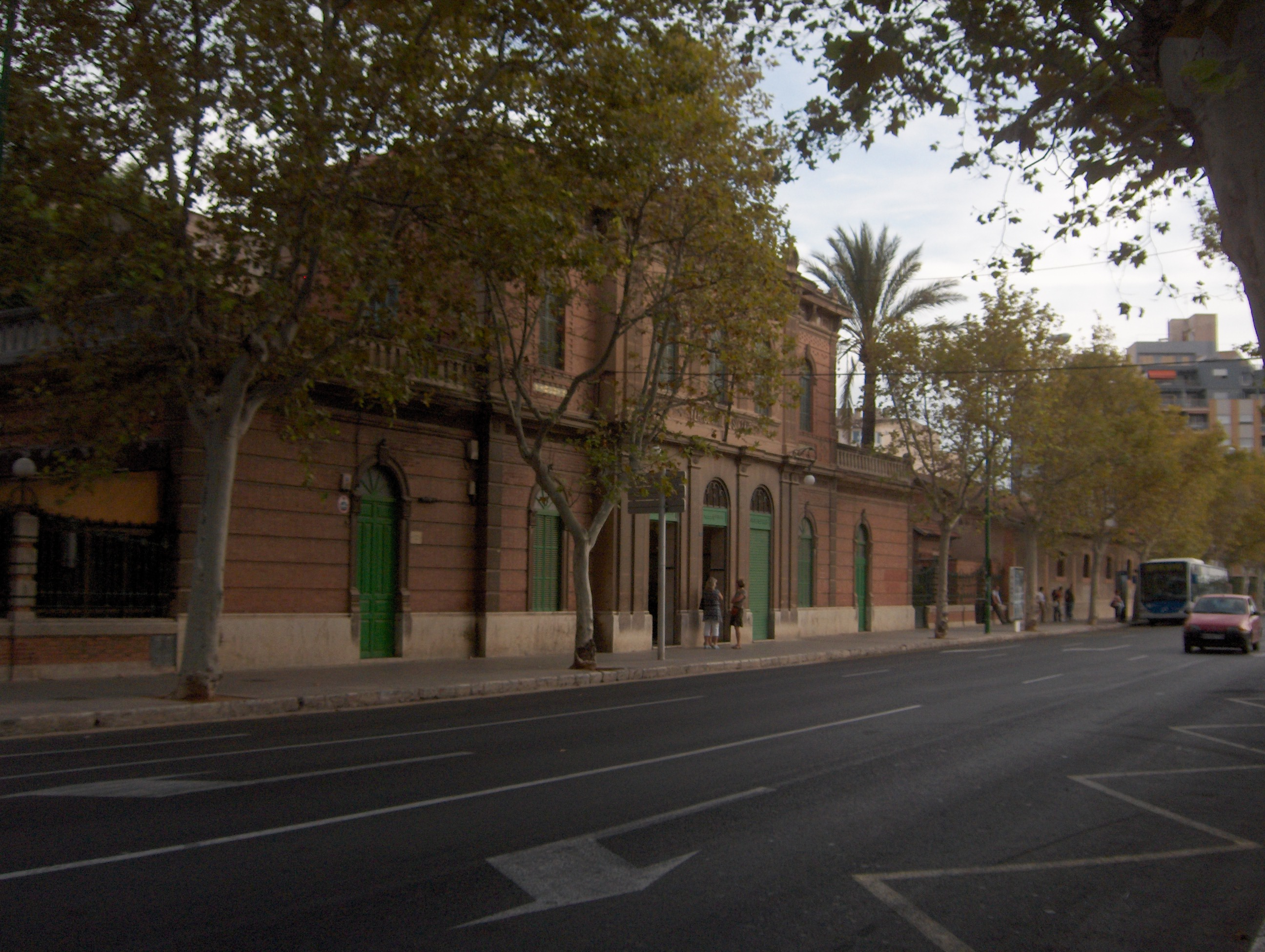 FS Train Station from Plaça Espanya/Calle Eusebio Estada